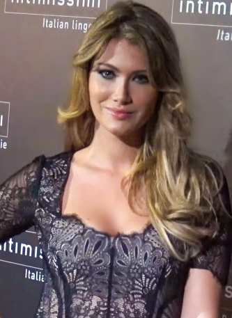 Intimissimi cumple 20 años y lo celebra por todo lo alto en Madrid con la visita de la cotizada modelo rusa: Irina Shayk. La firma ha conmemorado este cumpleaños celebrando una glamurosa fiesta en la Embajada Italiana. La modelo ha estado acompañada de muchos rostros famosos como Eugenia Silva, Ariadne Artiles, Mireia Lalaguna, Lady Addict, Peter Vives, Alex Gonzalez o Jon Kortajarena entre otros.